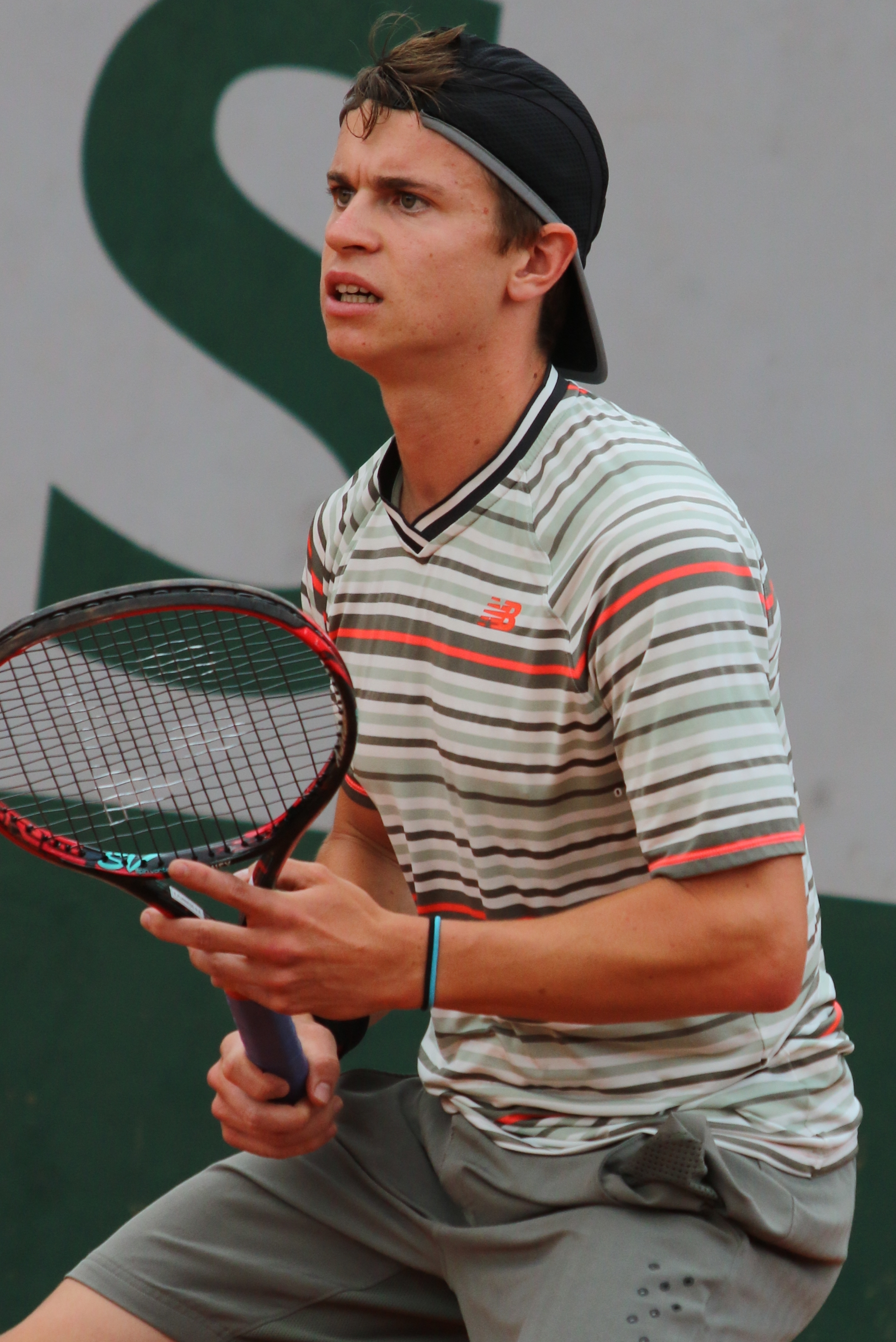 Furness RG18 (8)